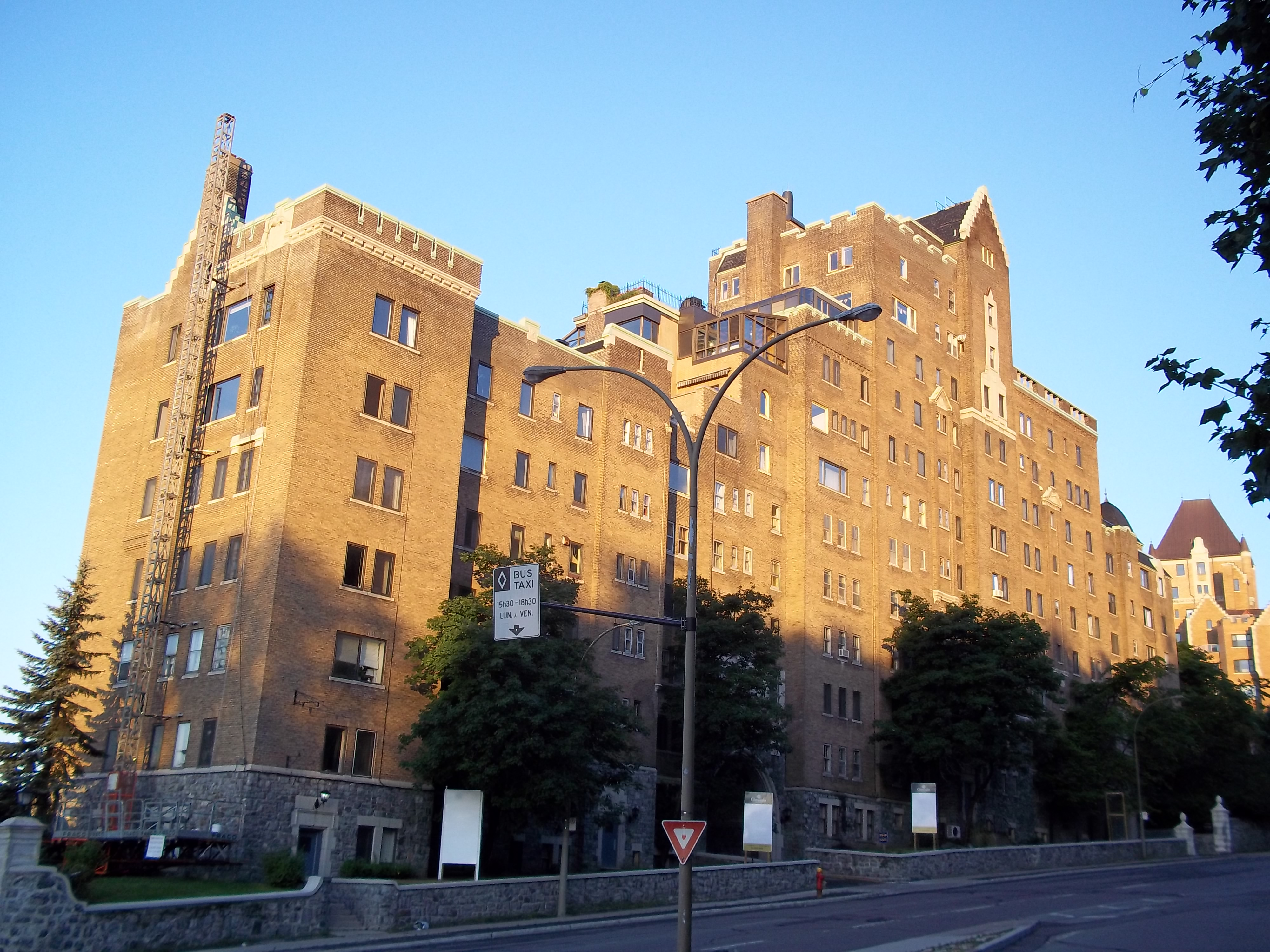 Immeuble Gleneagles, 3940, chemin de la Côte-des-Neiges, Montréal